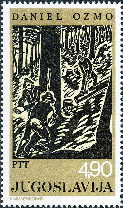 Woordcutters by Daniel Ozmo